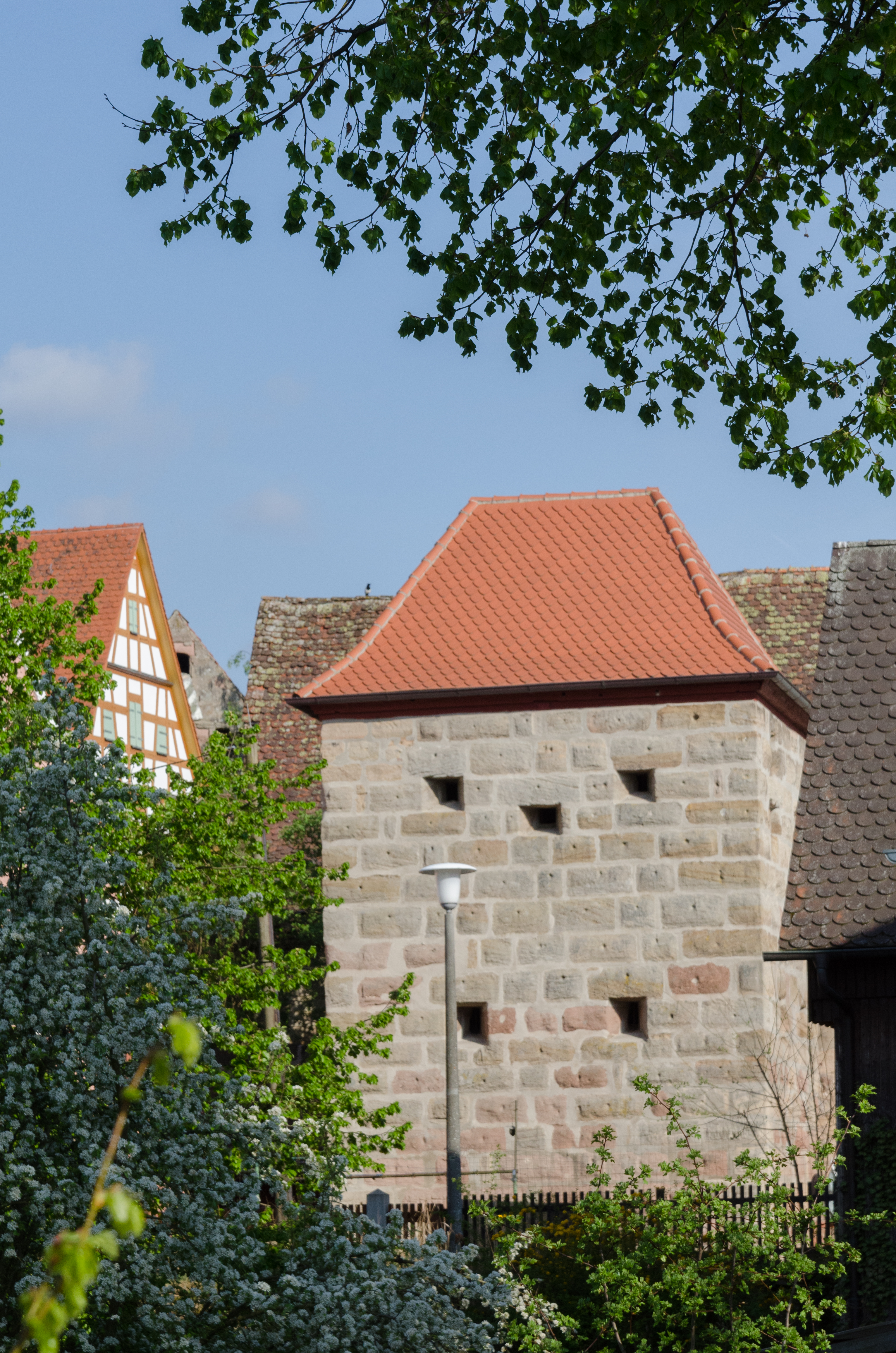 Abenberg, Jägersteig 4